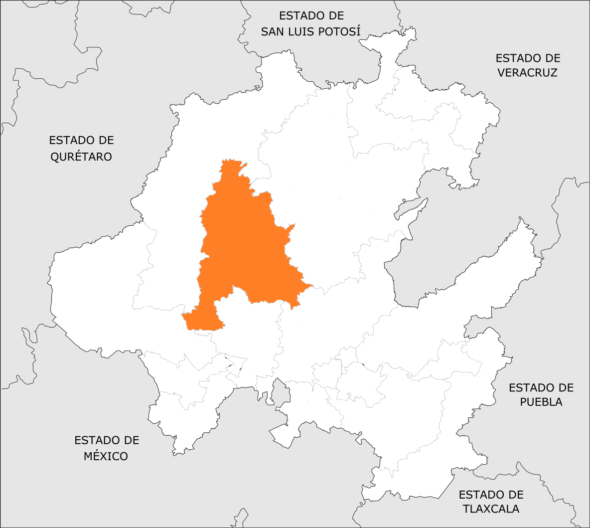 Distrito Electoral Local de Hidalgo 05